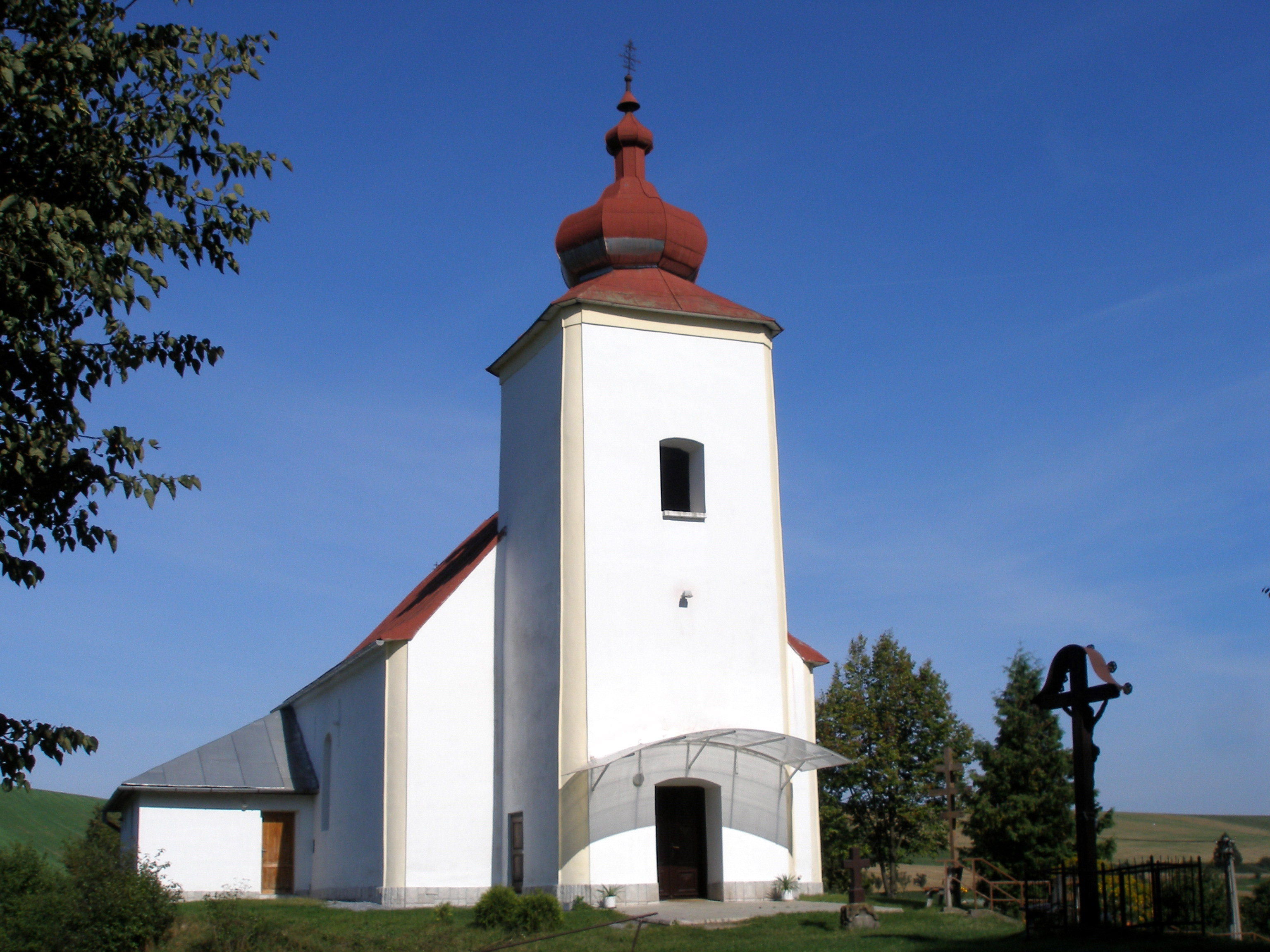 Obec Ľubovec okres Prešov, región Šariš.